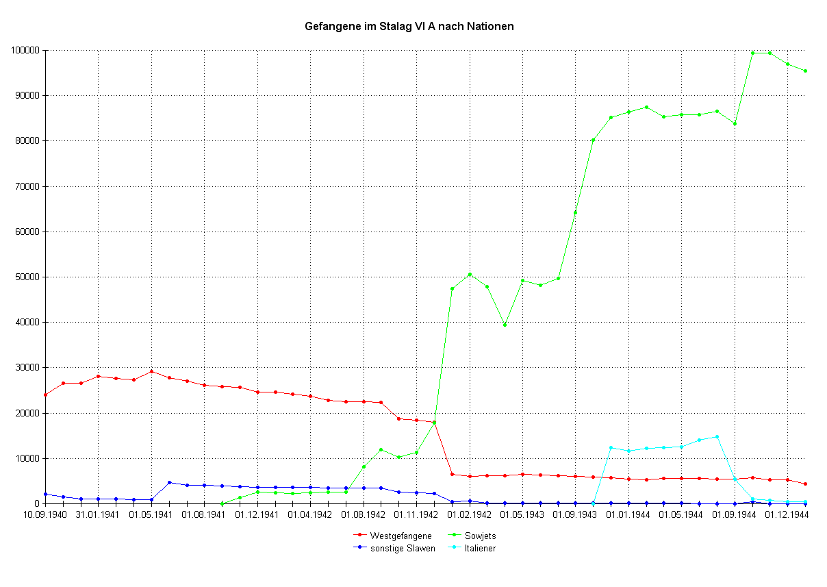 Belegung des Stalag VI A nach Nationalitäten (10.09.1940-01.01.1945)